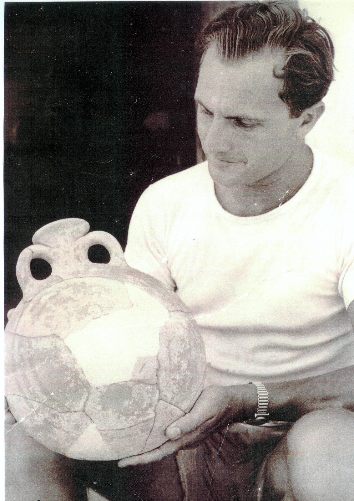 אלישע לינדר ארכאולוג ימי במוזיאון הימי הראשון בשנת 1963